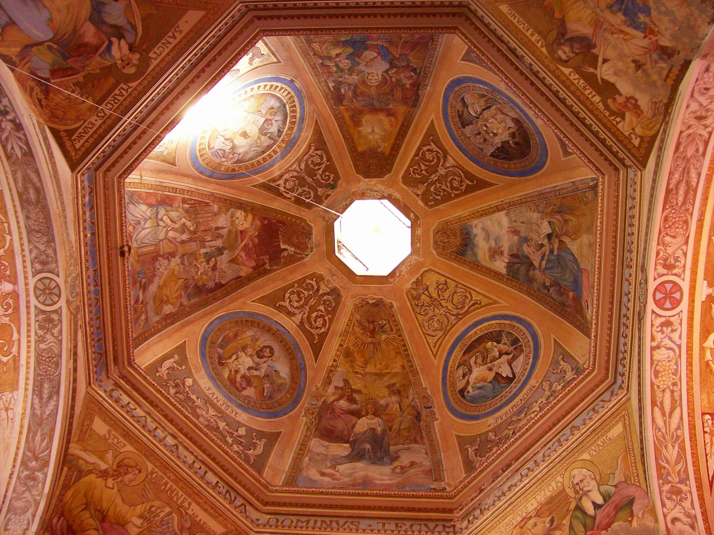 Painted ceiling of the Templo Parroquial de la Virgen de Aranzazú in Victoria, Entre Ríos, Argentina.